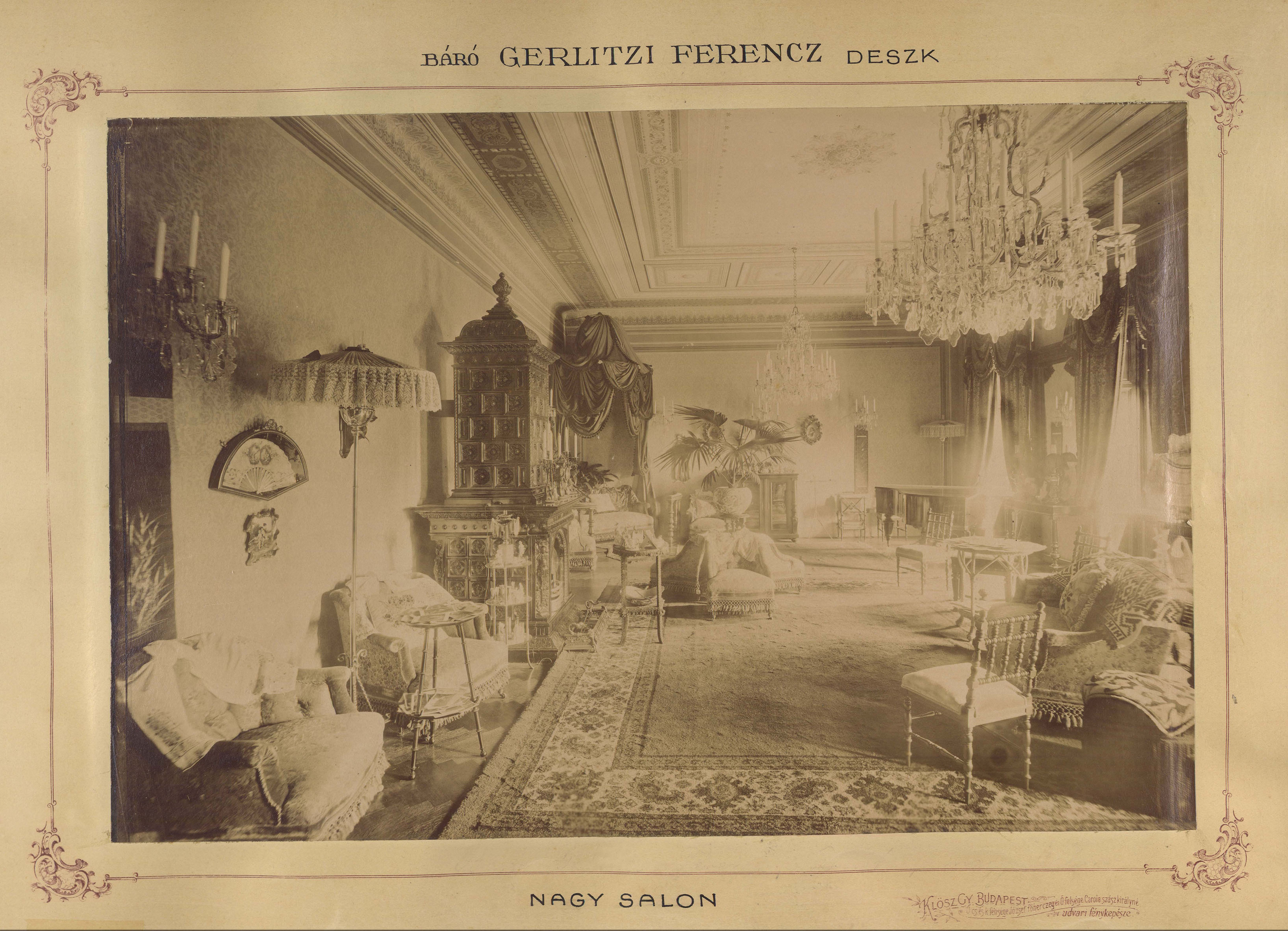 a Gerliczy-kastély nagyszalonja. Location: Hungary, Deszk Tags: interior, chandelier, floor lamp, tile stove